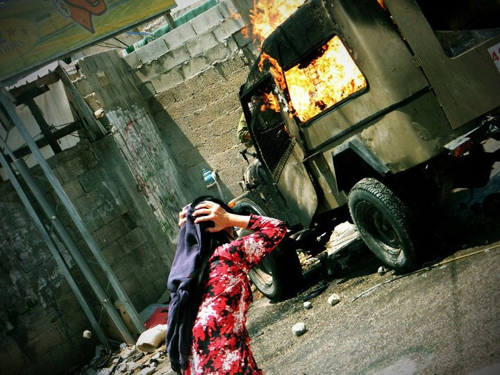 מתוך סרטו של יריב הורוביץ רוק בקסבה